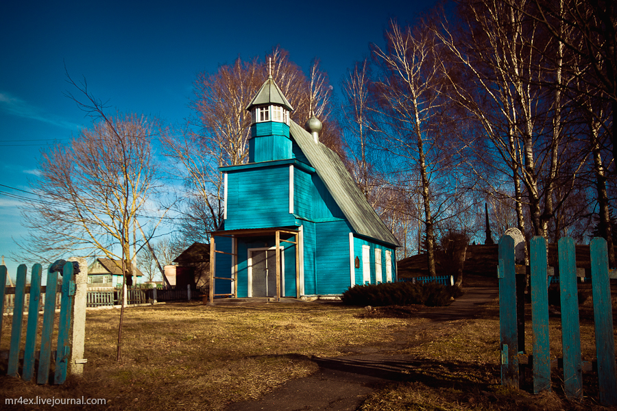 Асвея. Царква Святога Георгія